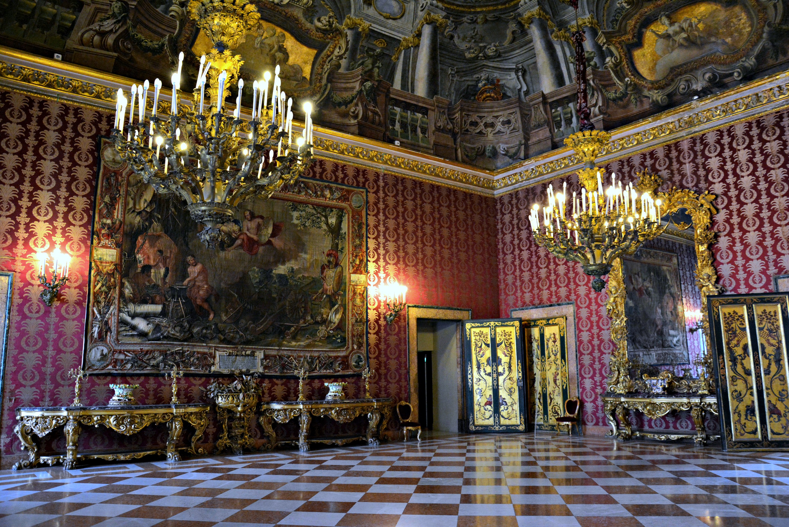 Vedi titolo